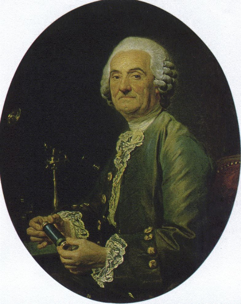 Portrait of Pierre Charles Le Monnier (or Le Monnier) (1715-1799), French astronomer